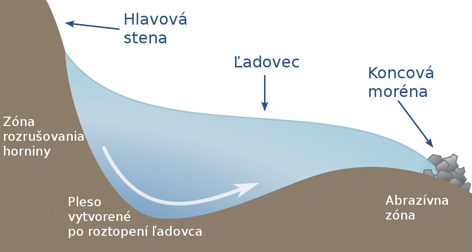 Vznik plesa činnosťou ľadovca